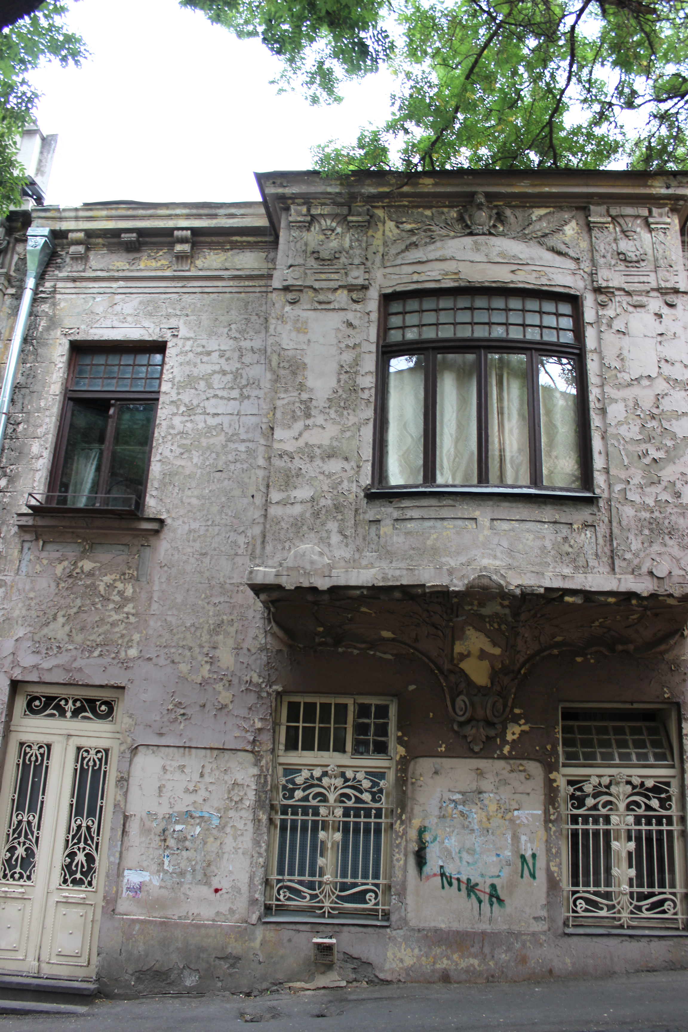 საცხოვრებელი სახლი Tbilisi 9 April St. N2